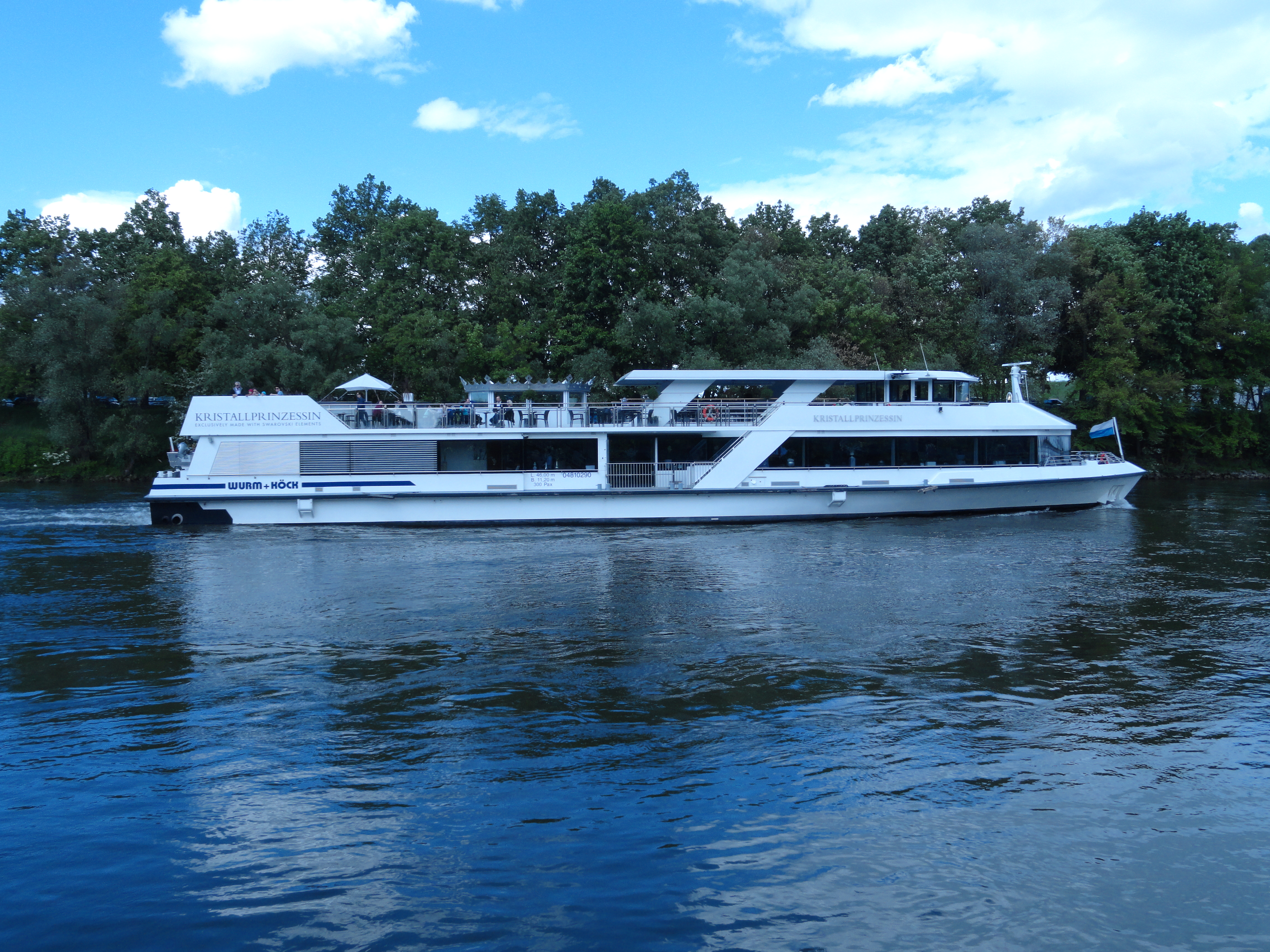 Kristallprinzessin in Regensburg in Fahrt